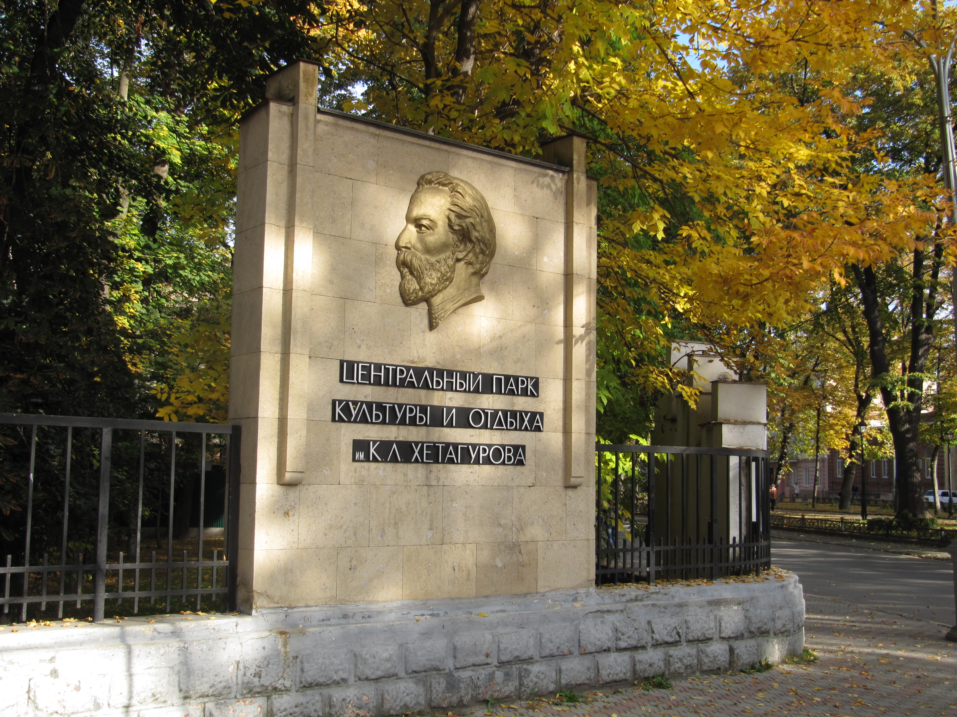 Центральный парк имени Косты Хетагурова, Владикавказ, Северная Осетия